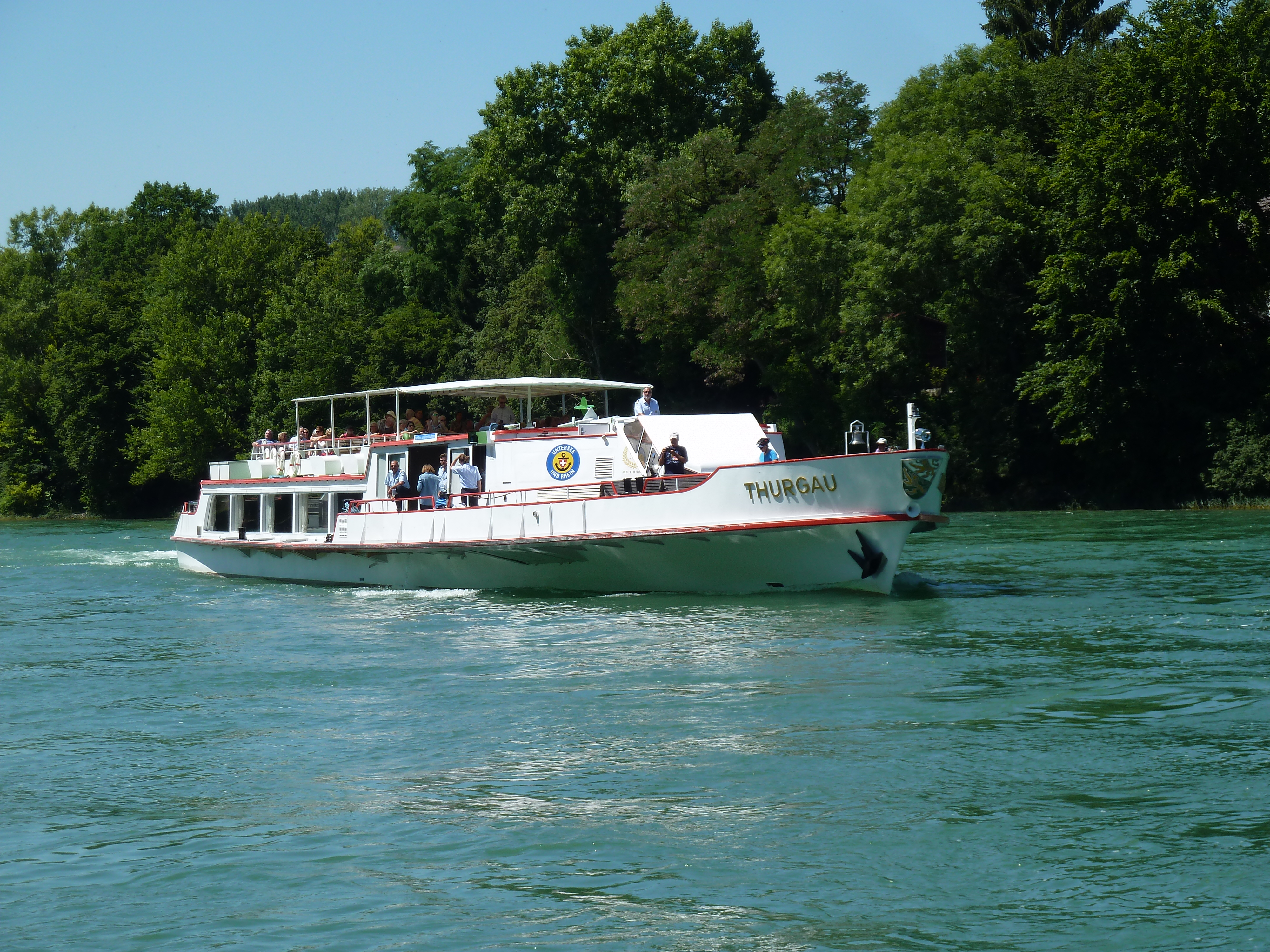 MS Thurgau mit abgeklappten Steuerhaus auf dem Hochrhein, kurz vor der niedrigen Brücke von Diessenhofen.